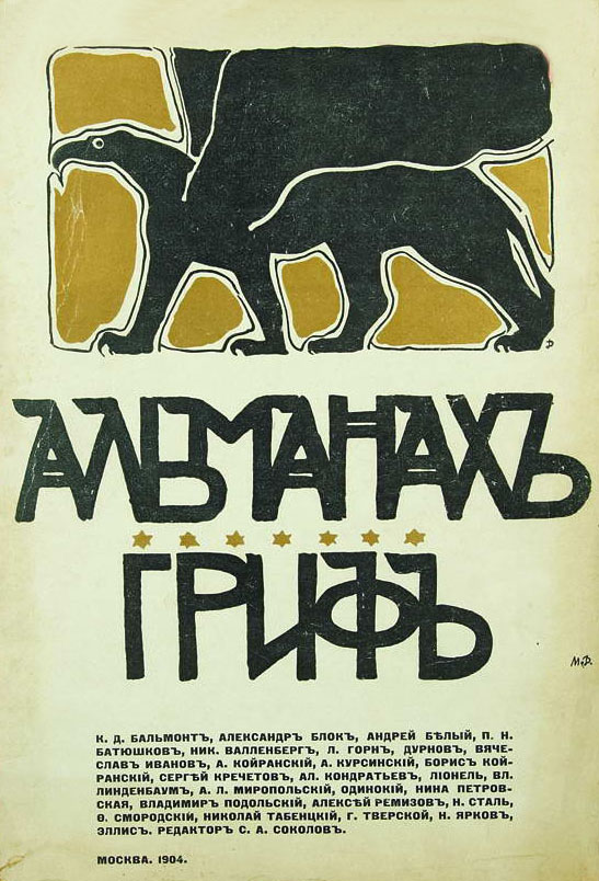 Almanac «Grif»